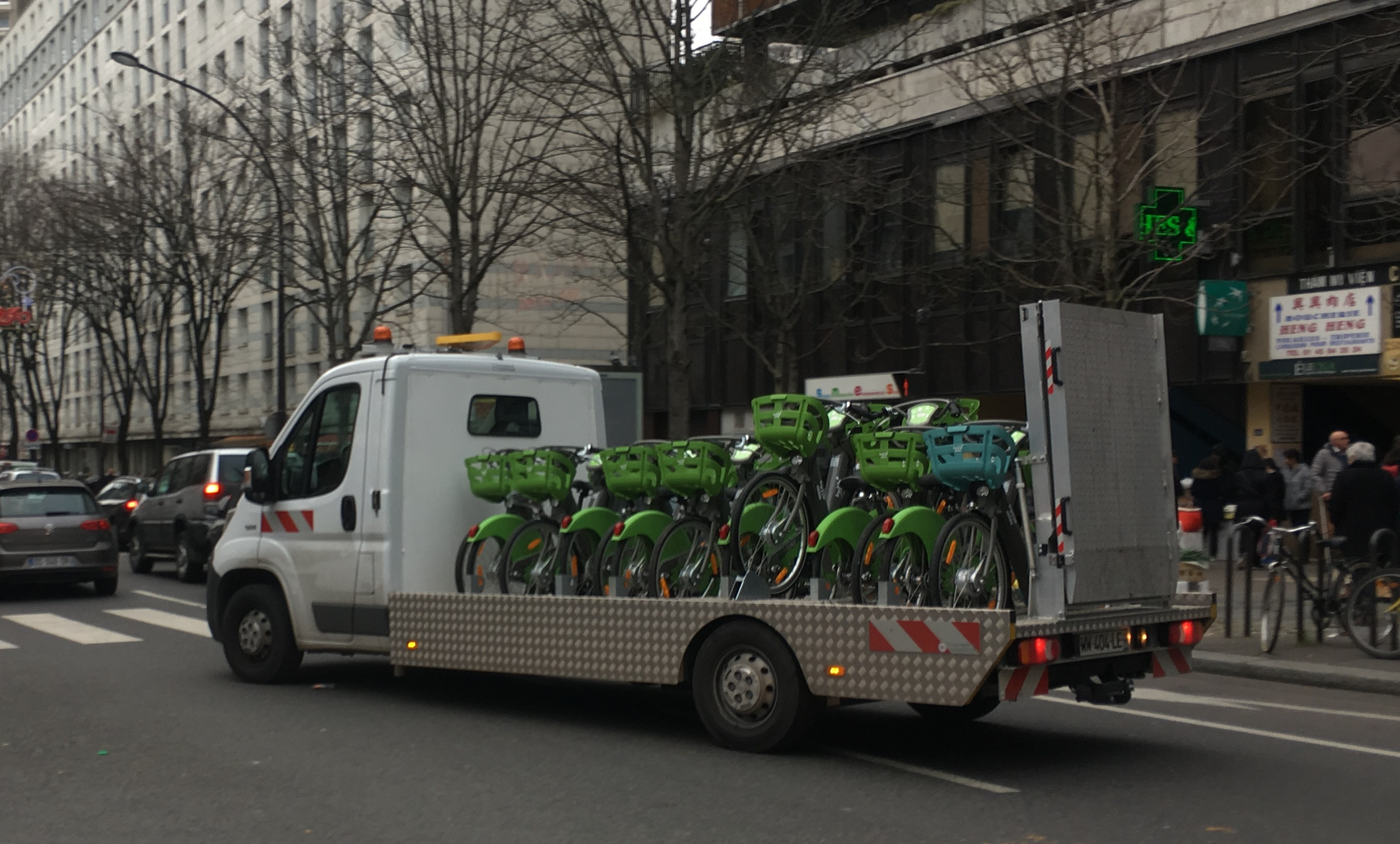 Véhicule de transport des vélib